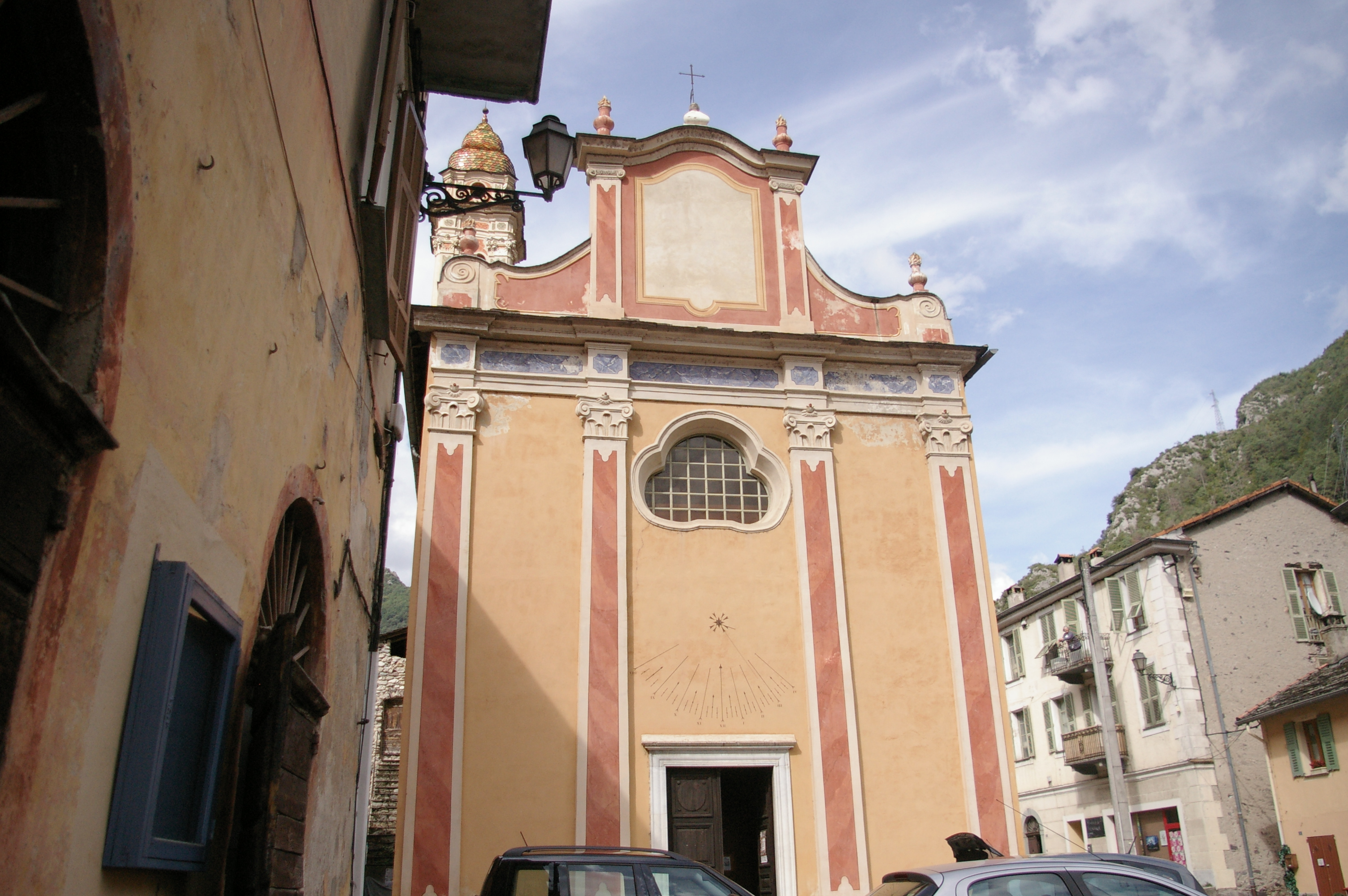 Église Notre-Dame-de-la-Visitation extérieur .